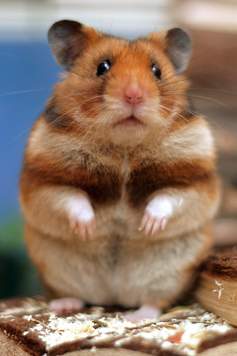 Goldhamster im Terrarium